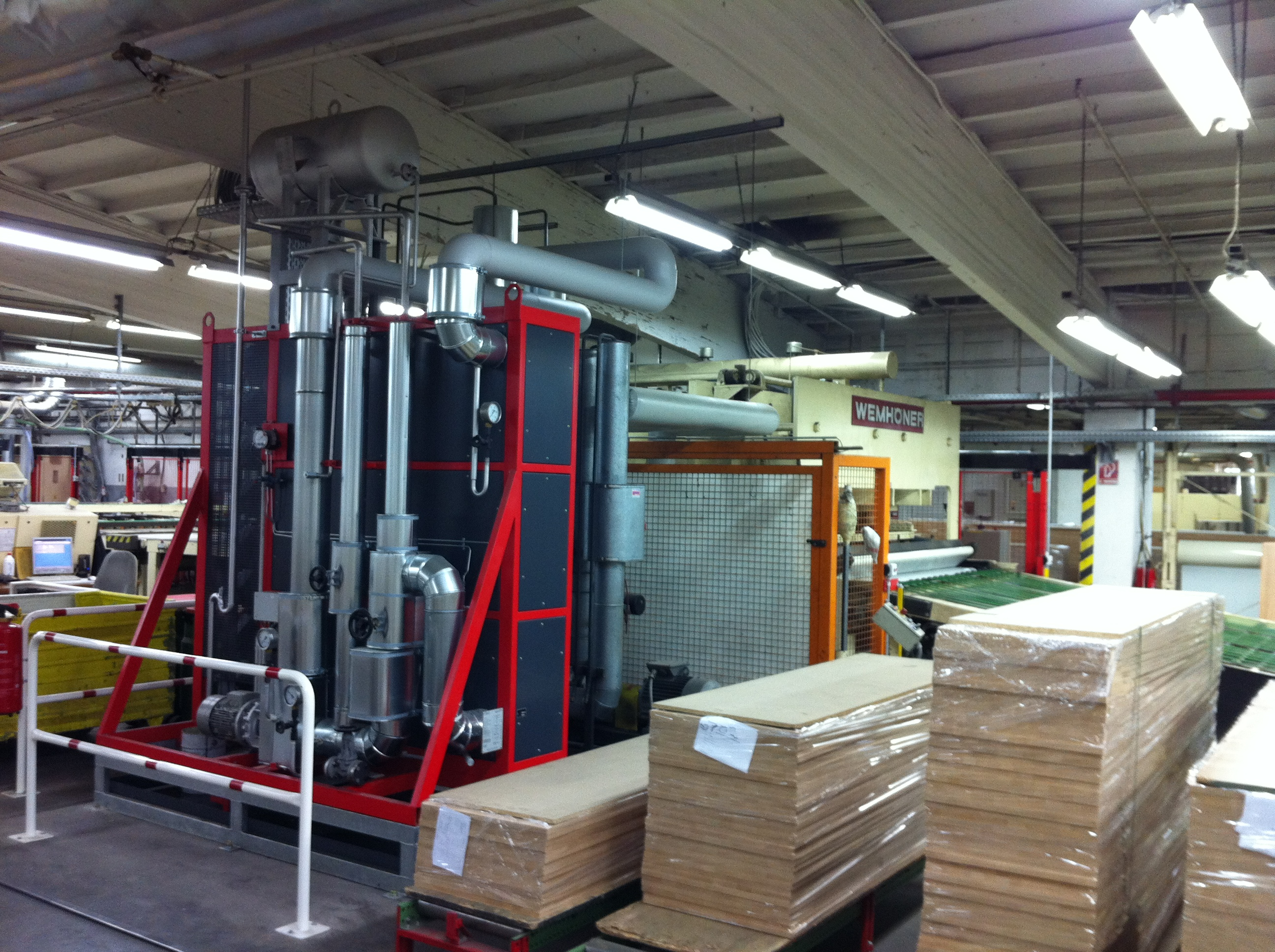 Elektro-Thermoölheizung an der Pressenstraße eines Möbelwerkes